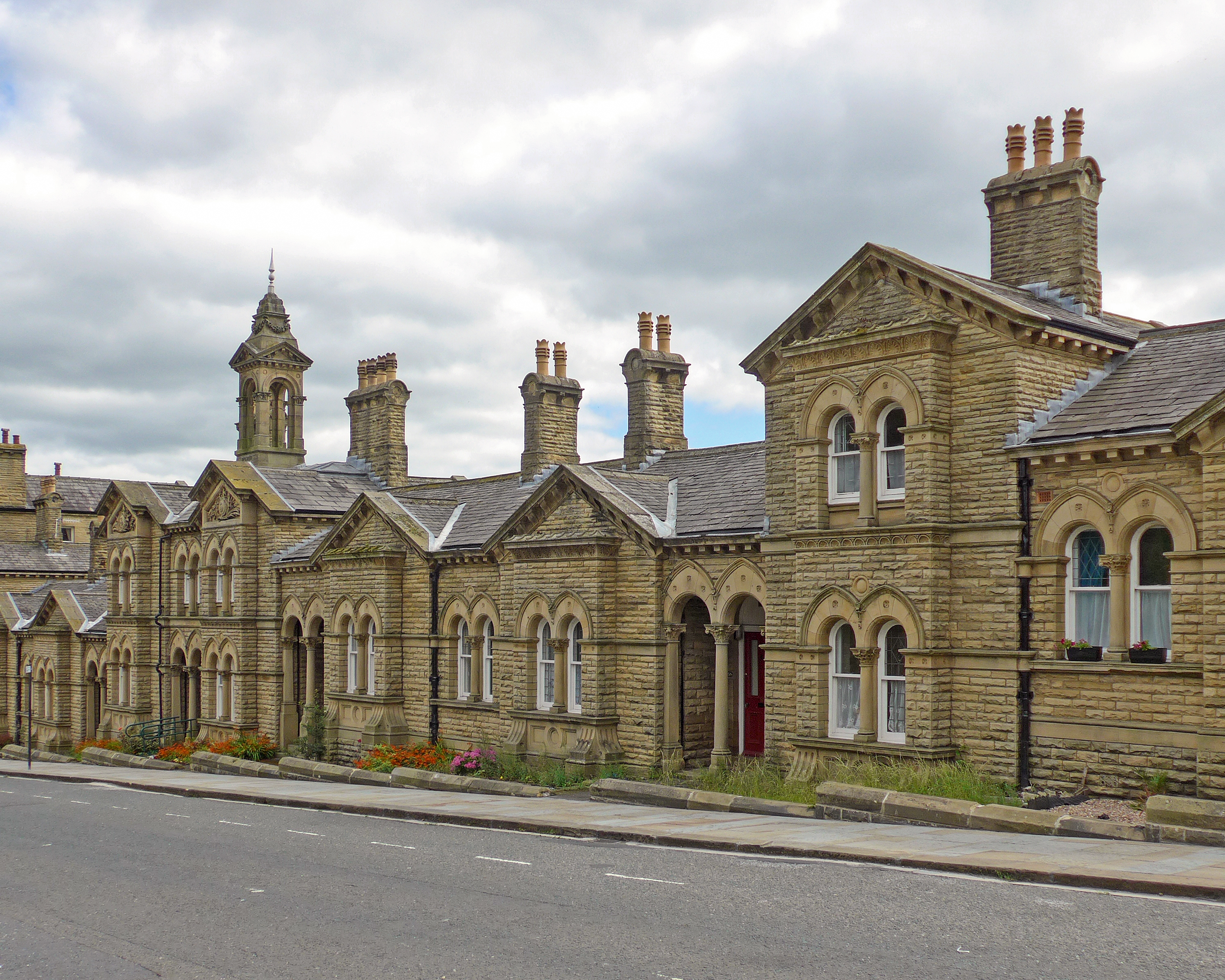 Saltaire